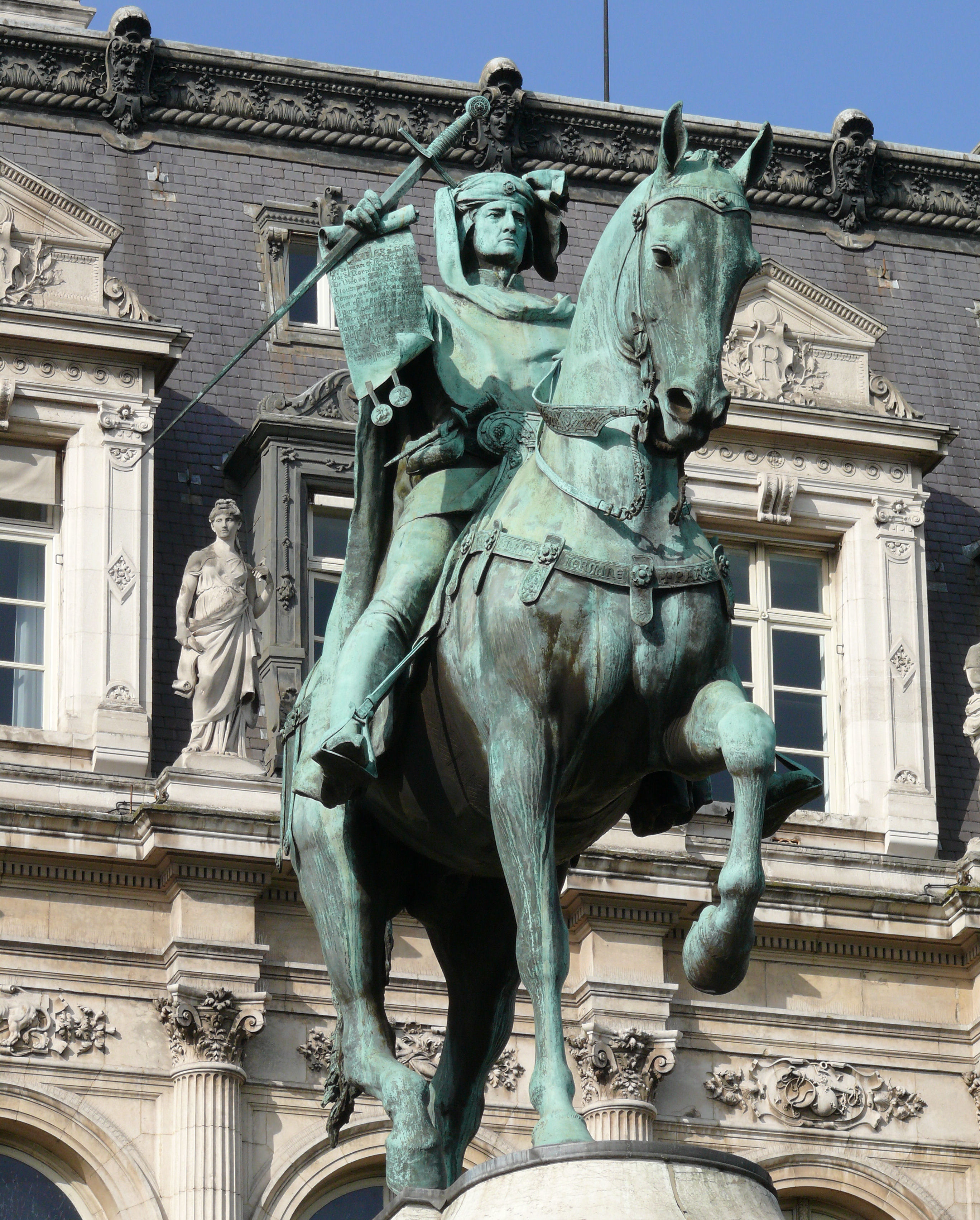 Paris - Statue d'Etienne Marcel devant l'hôtel de ville